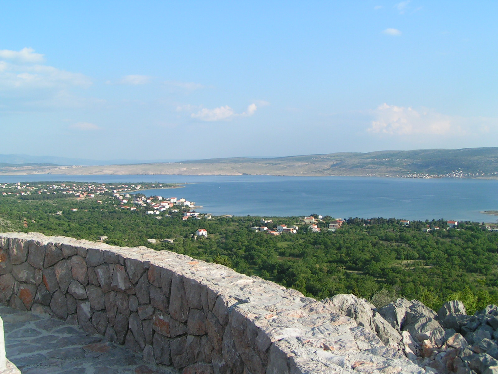 Vyhlídka nad Starigradem